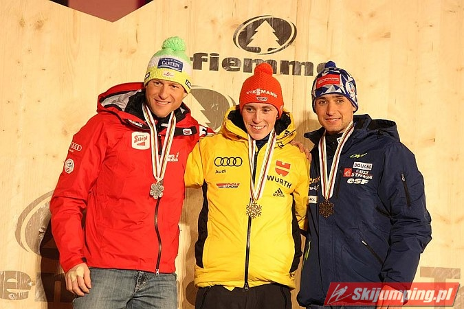 Dekoracja medalowa zawodów indywidualnych HS 134/10 km